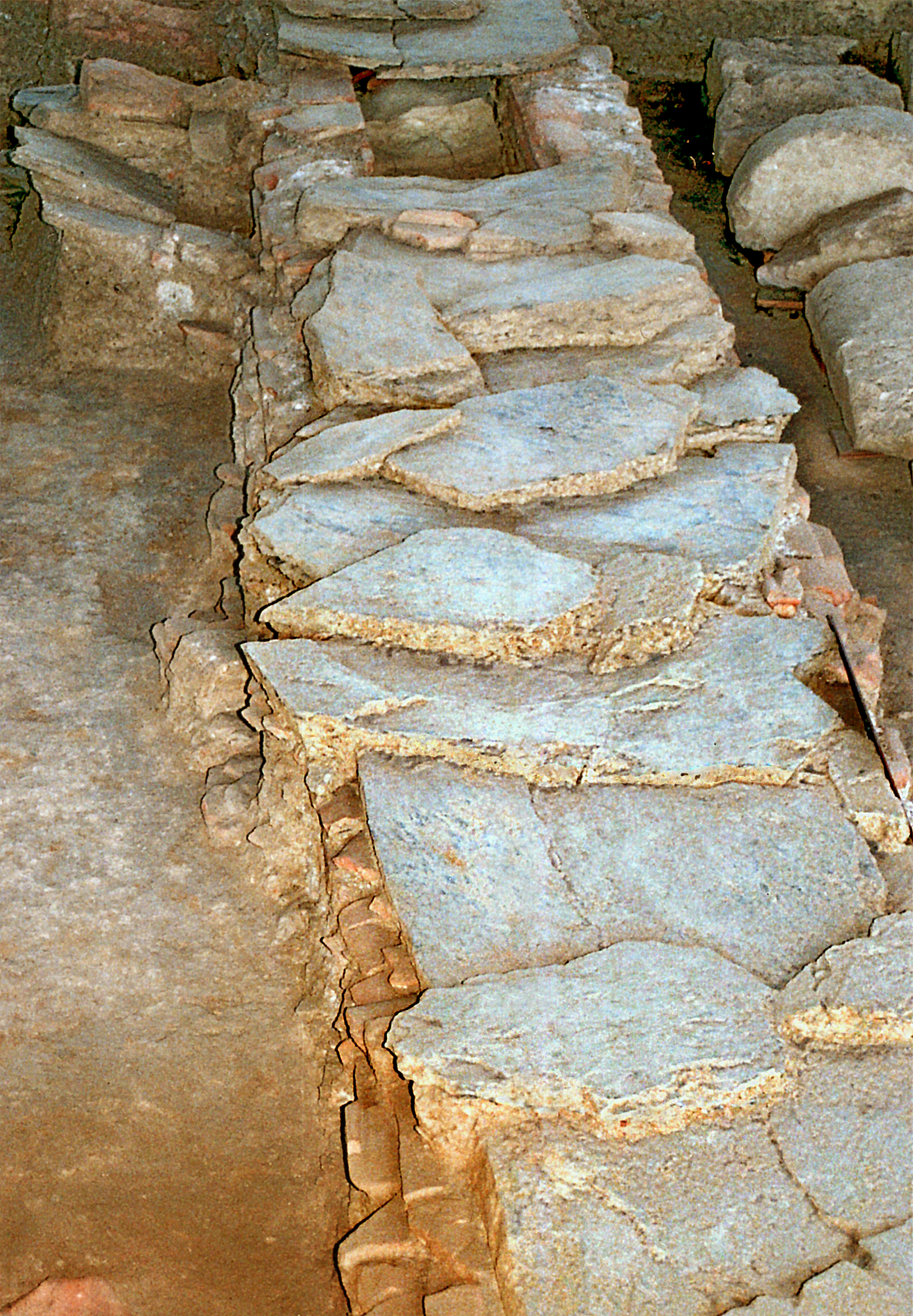 Unter das antike Laufniveau von Haus II freigelegter abgedeckter wasserdichter Kanal westlich der Stirnseite von Haus II. Dieses Wasserbauwerk wurde zeitgleich mit Haus II errichtet und versorgte nicht nur ein längliches Becken, sondern auch Haus und Privatbad mit ständig frischem Wasser.